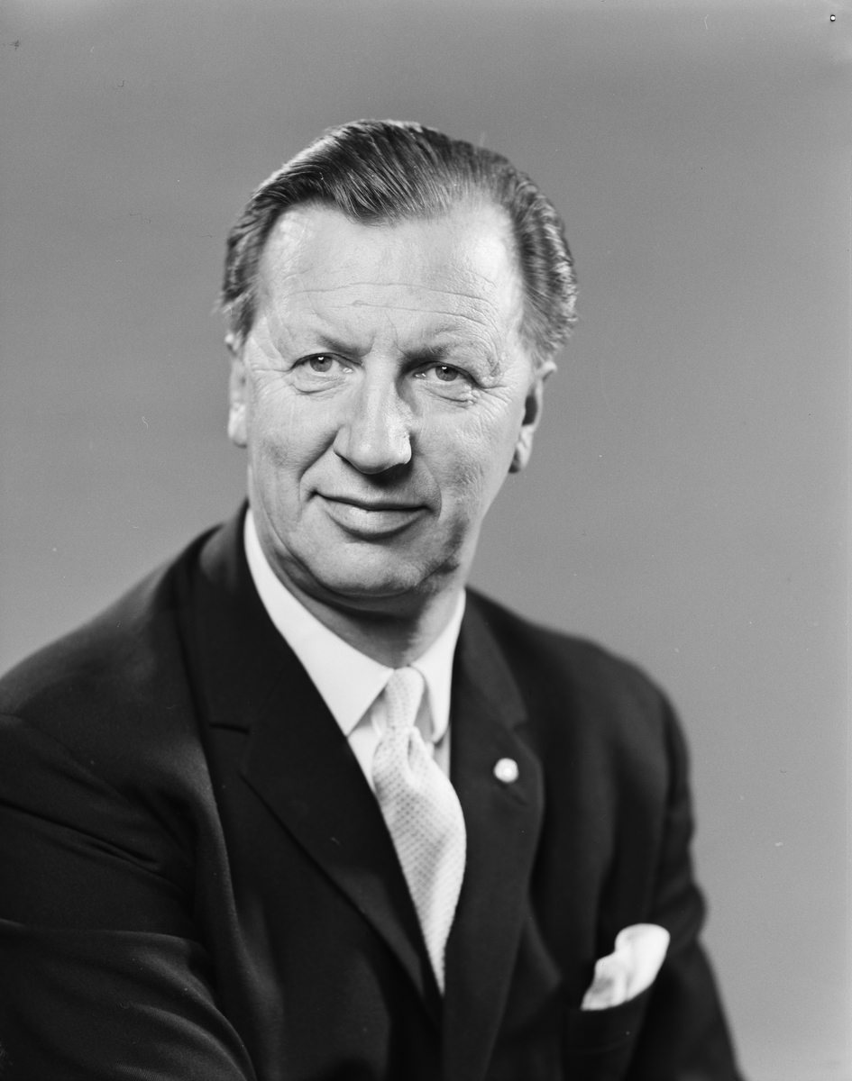 Ivar Tor Aspengren (1917–2004) was a Norwegian laborer, trade unionist and politician for the Labour Party. He led the Norwegian Confederation of Trade Unions from 1969 to 1977.